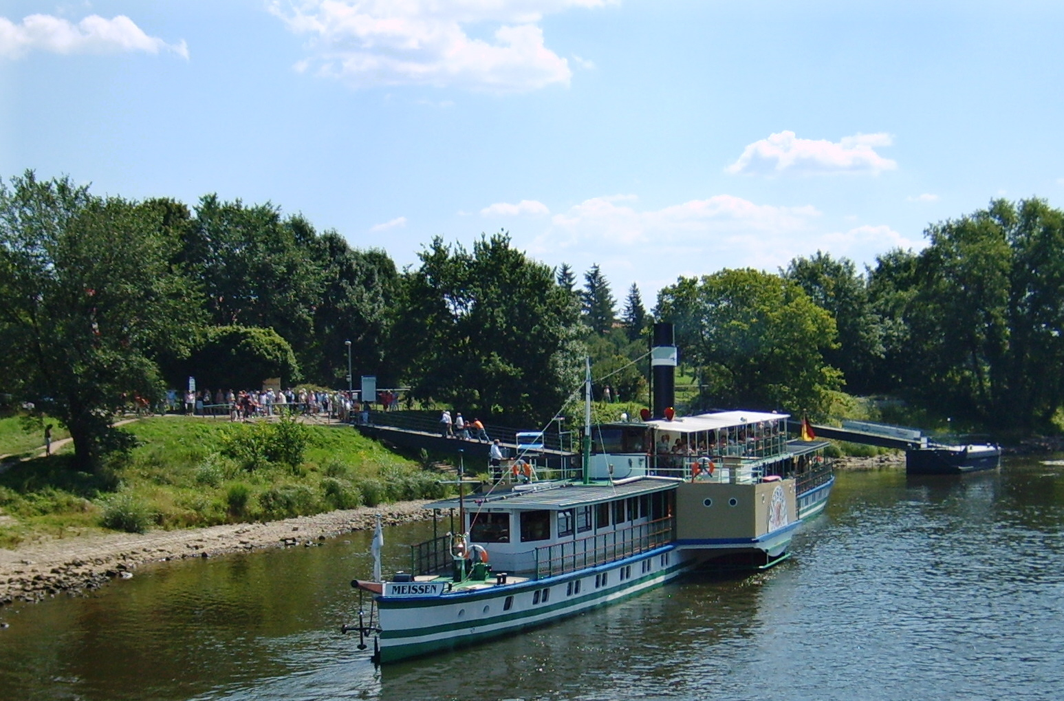 PD Meißen in Pillnitz 2008